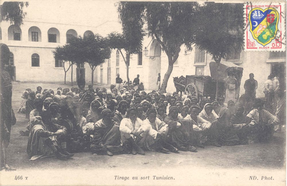 Tirage au sort de Tunisiens pendant le protectorat français pour désigner les conscrits du service militaire